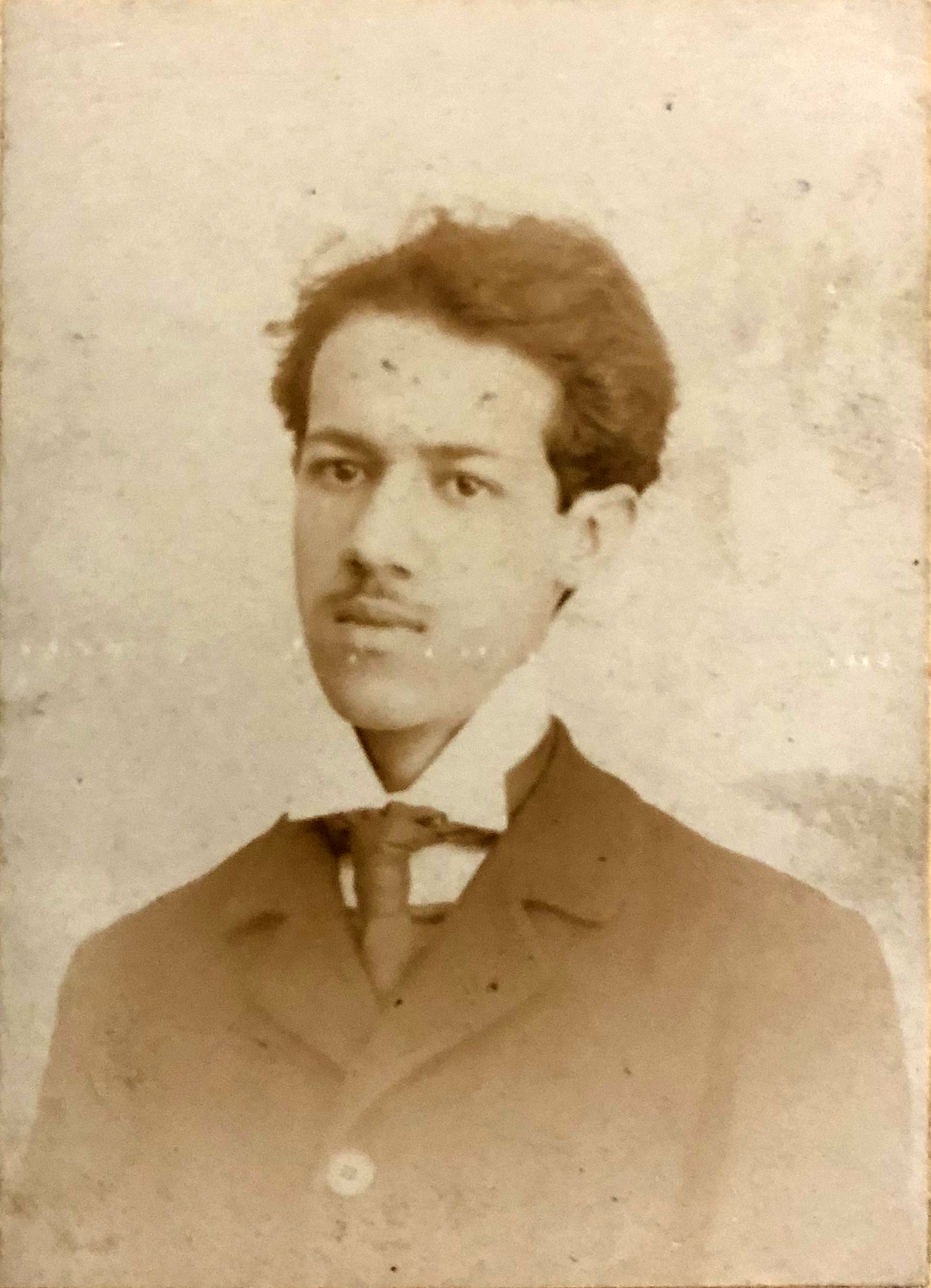 Fotografía antigua del entonces joven compositor mexicano José Pomar, tomada probablemente a inicios del siglo XX.